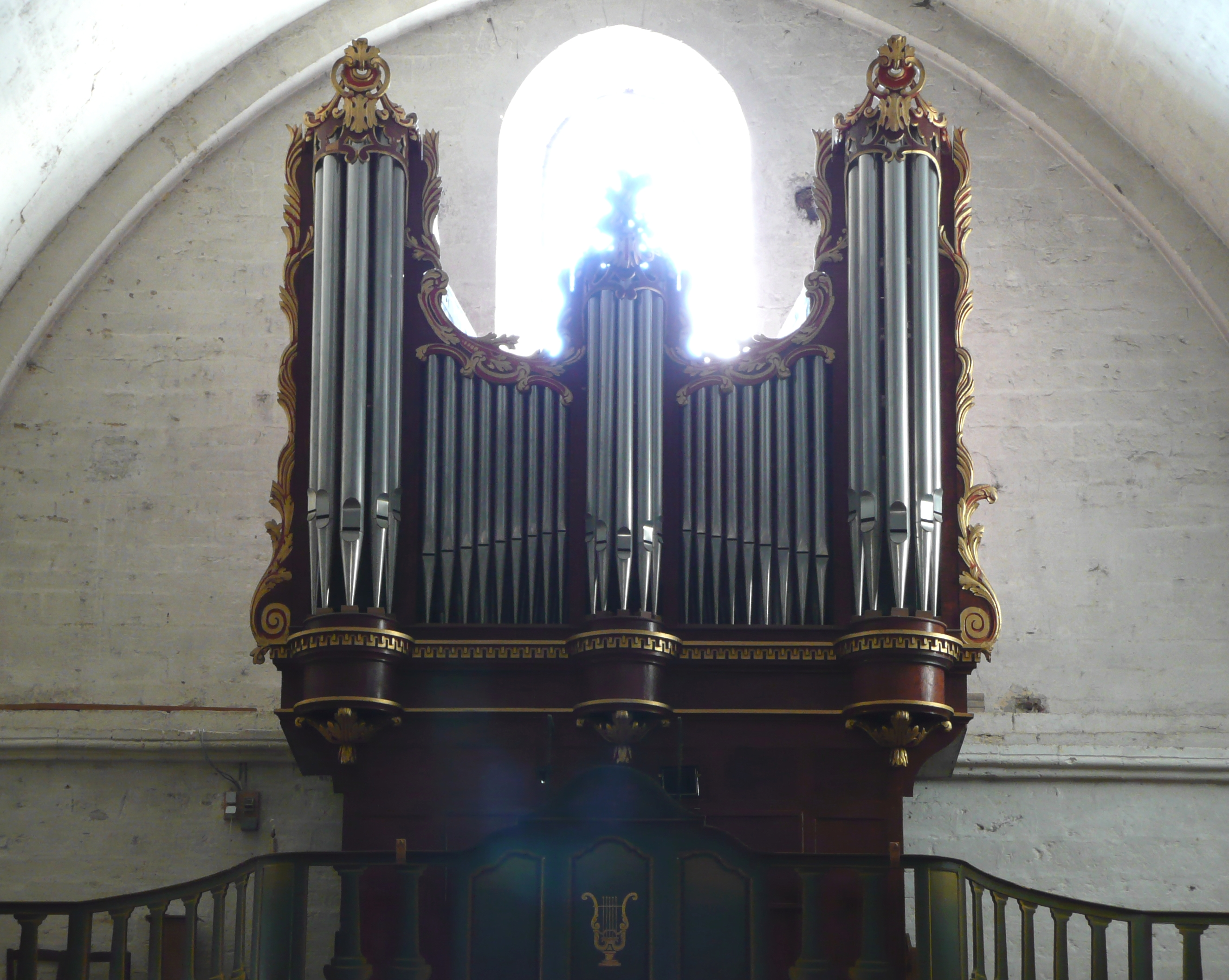 Reconstruit en 1788 par Messire Allemand, prêtre bénéficier de la cathédrale St Sauveur d'Aix-en-Provence, et Pierre Duges, facteur d'orgues de la même ville, dans un buffet neuf mais en réutilisant la tuyauterie de l'orgue de 8 jeux construit en 1614 par le célèbre Pierre Marchand.